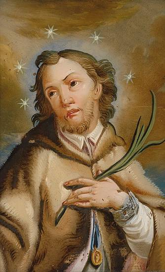 Hinterglasbild Hl. Johannes von Nepomuk, Augsburg, Ende 18. Jh., 16 x 11 cm